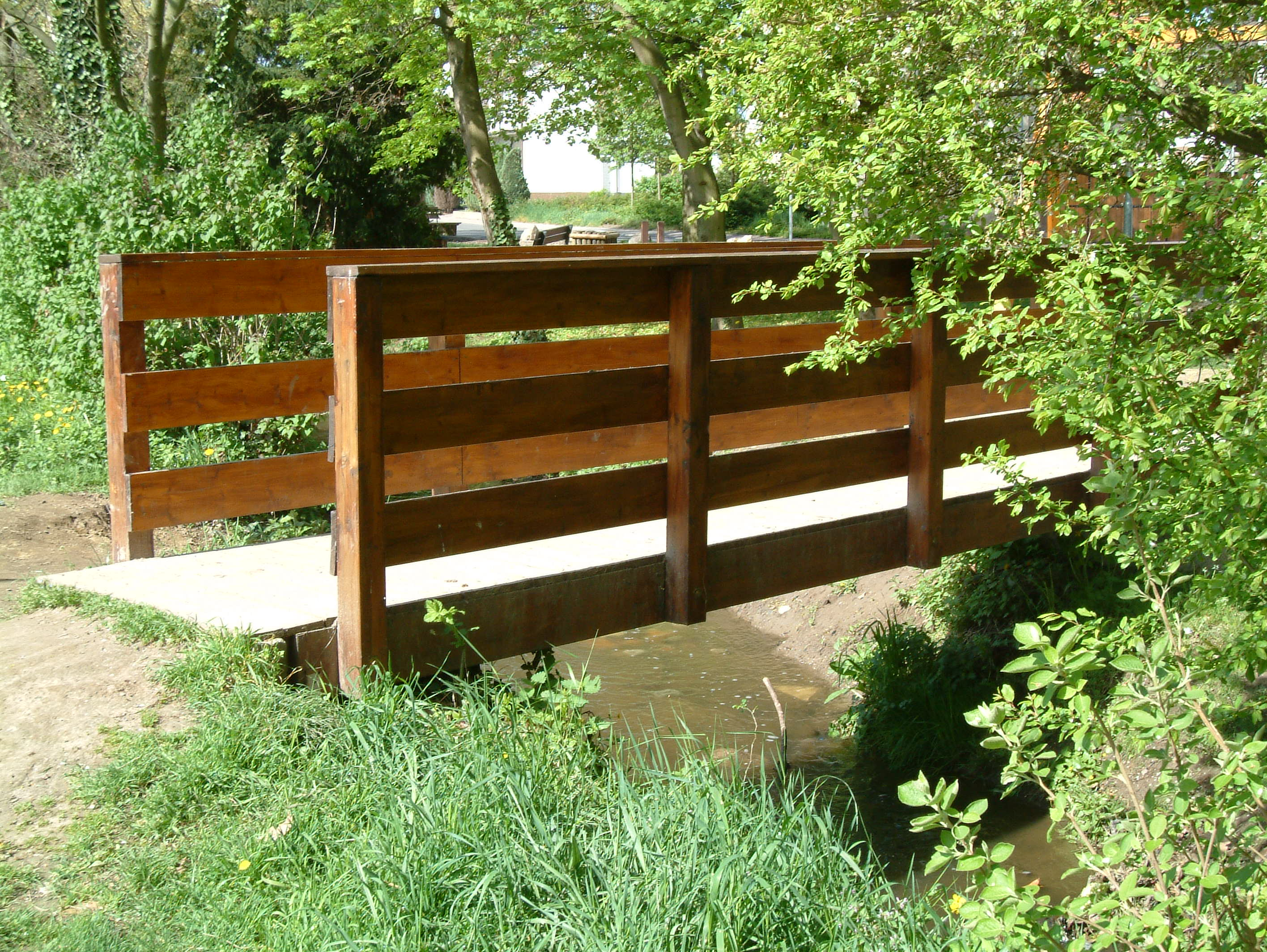 Eckbachbrücke zu Dirmstein, Aufnahme vom 28.04.2006 durch Benutzer:Mundartpoet